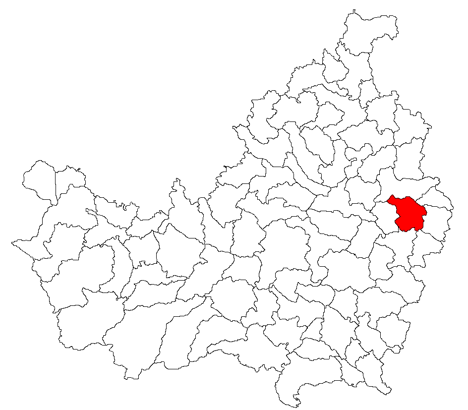 Categorie:Hărţi ale judeţului Cluj